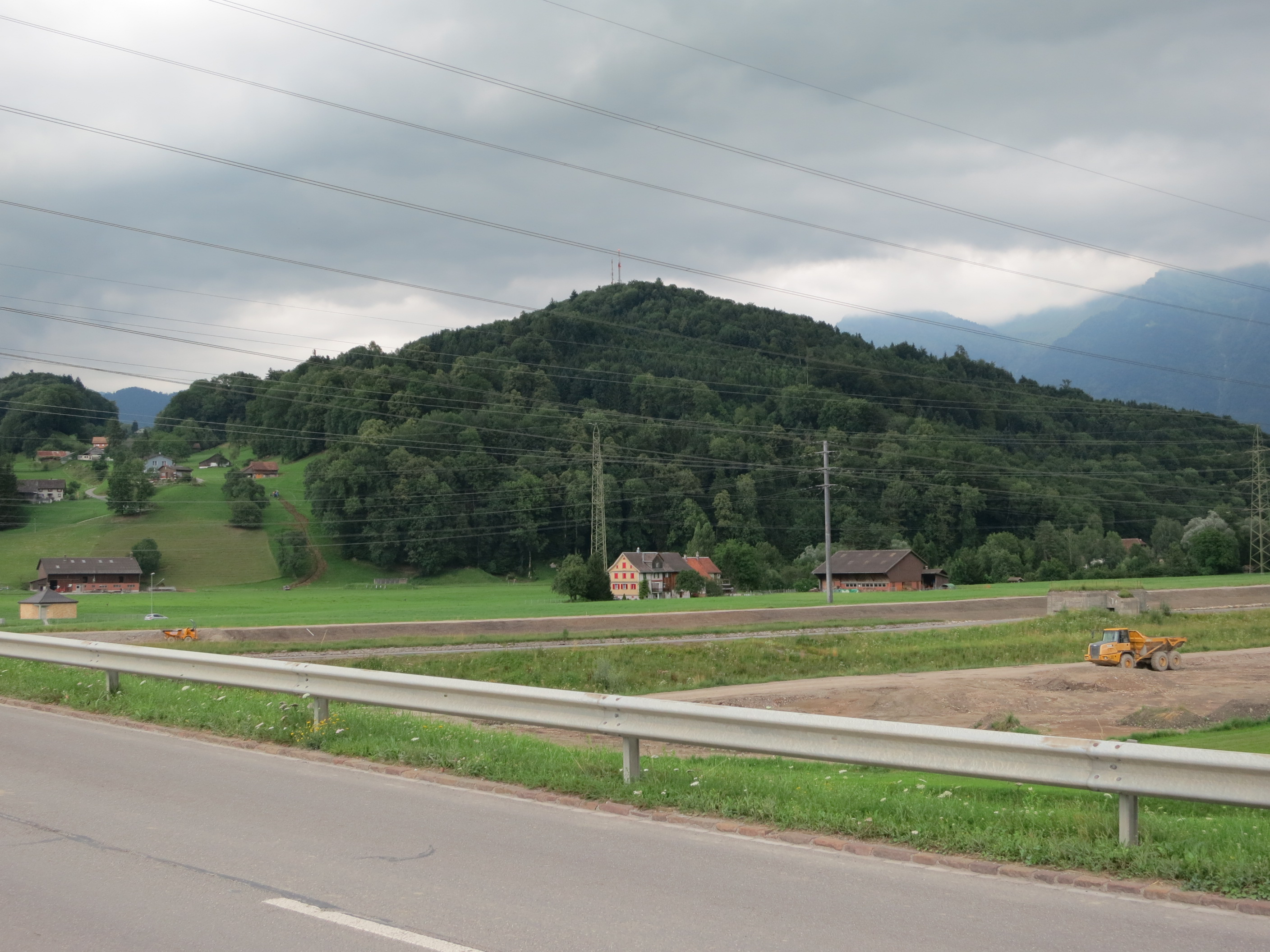 Benkner Büchel, Benken SG, Schweiz